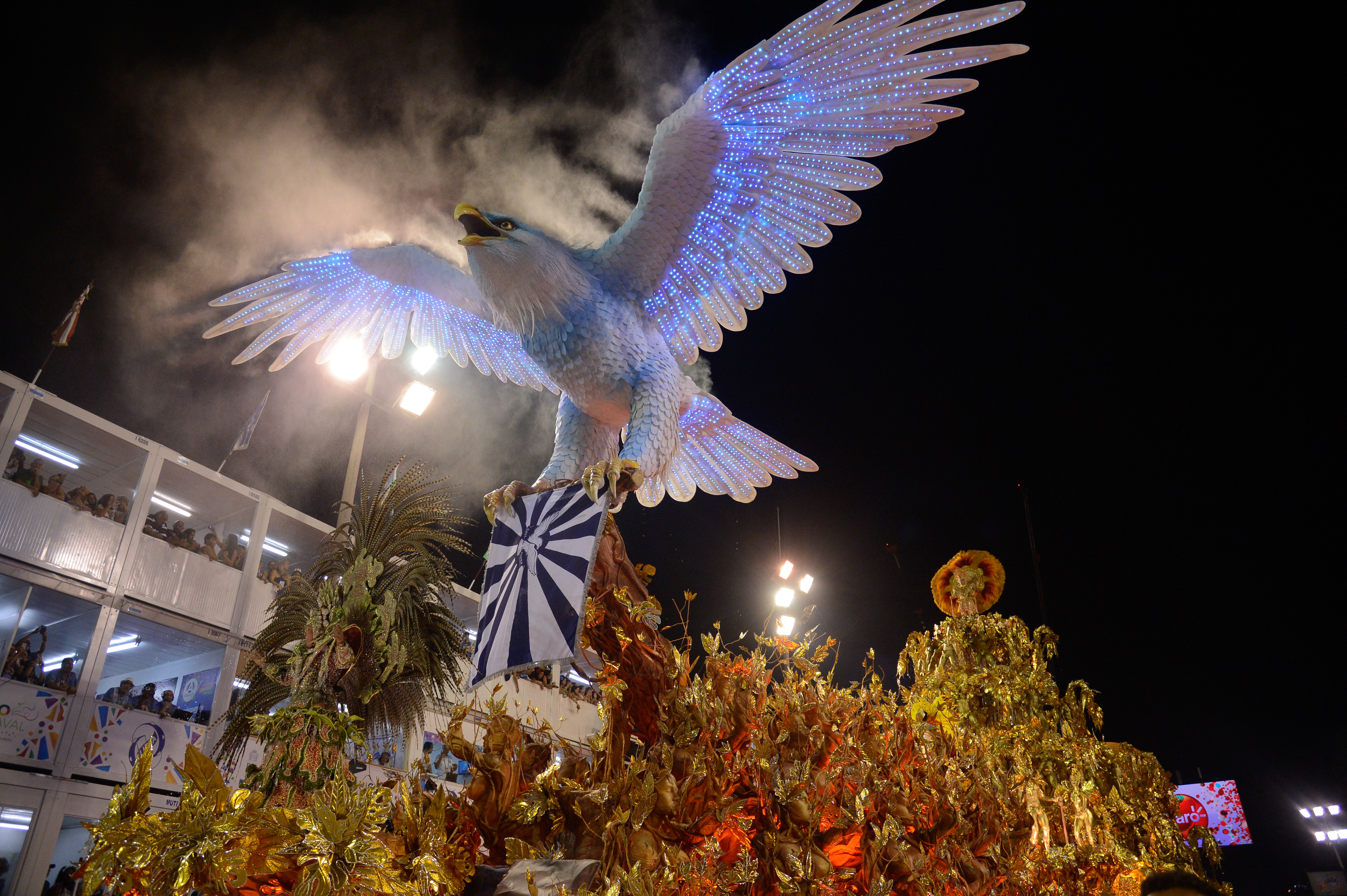 Rio de Janeiro - Desfile da escola de samba Portela, pelo grupo especial, no Sambódromo (Fernando Frazão/Agência Brasil)